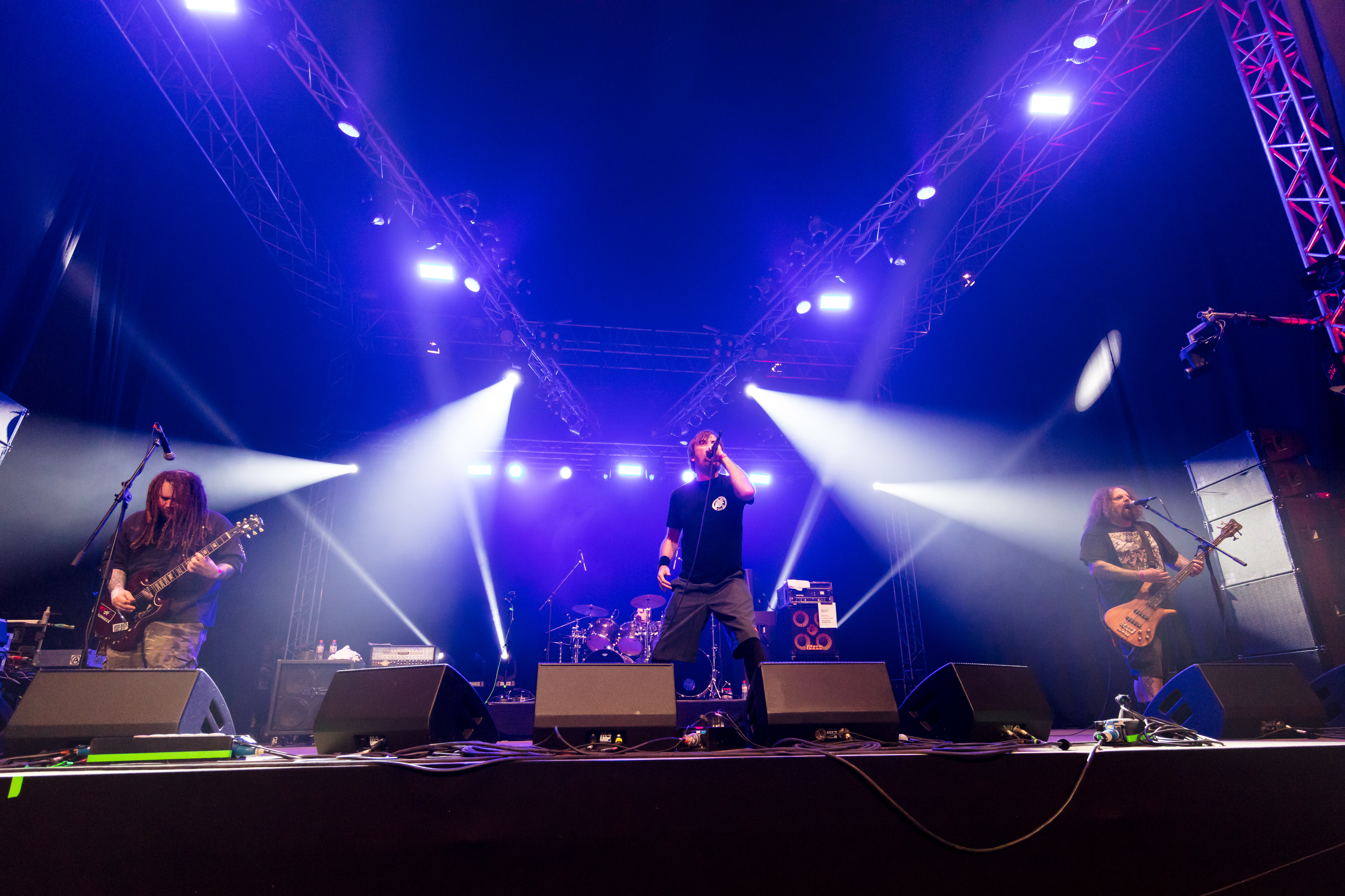 Napalm Death during Wacken Open Air at Schleswig-Holstein, Wacken, , Germany on 2017-08-03, Photo: Sven Mandel